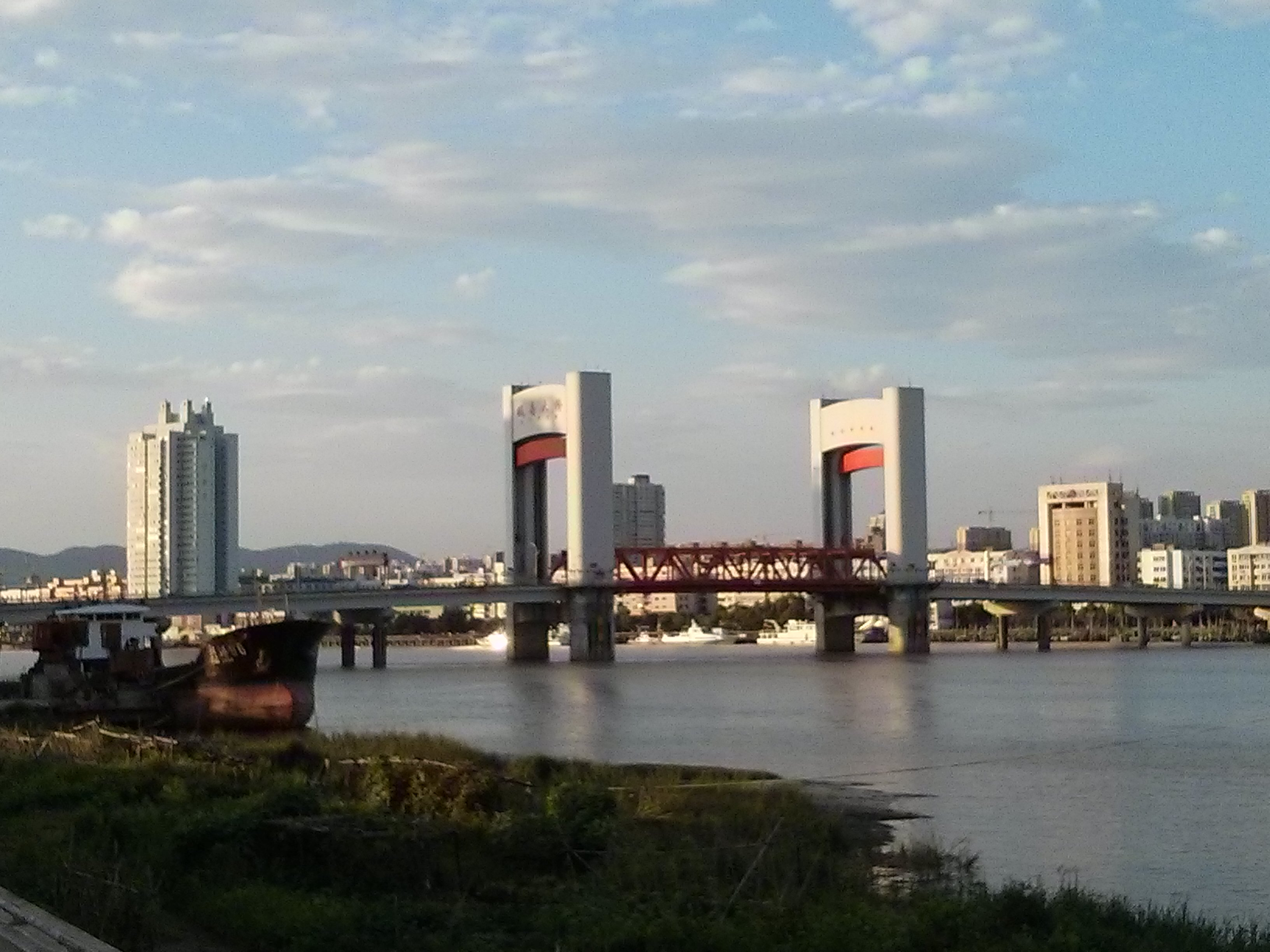 温州市苍南县瓯南大桥